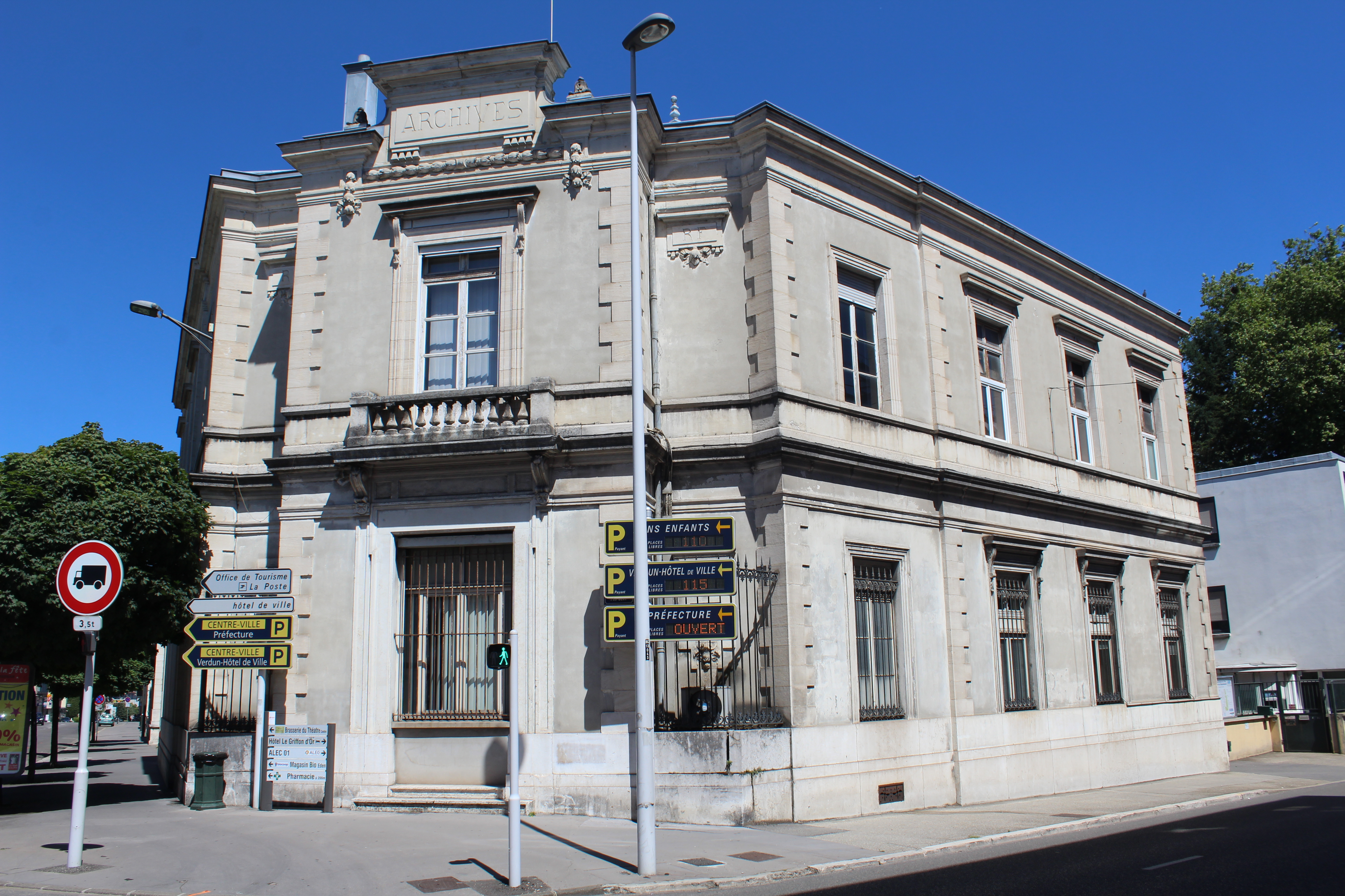 Anciennes archives, Bourg-en-Bresse.